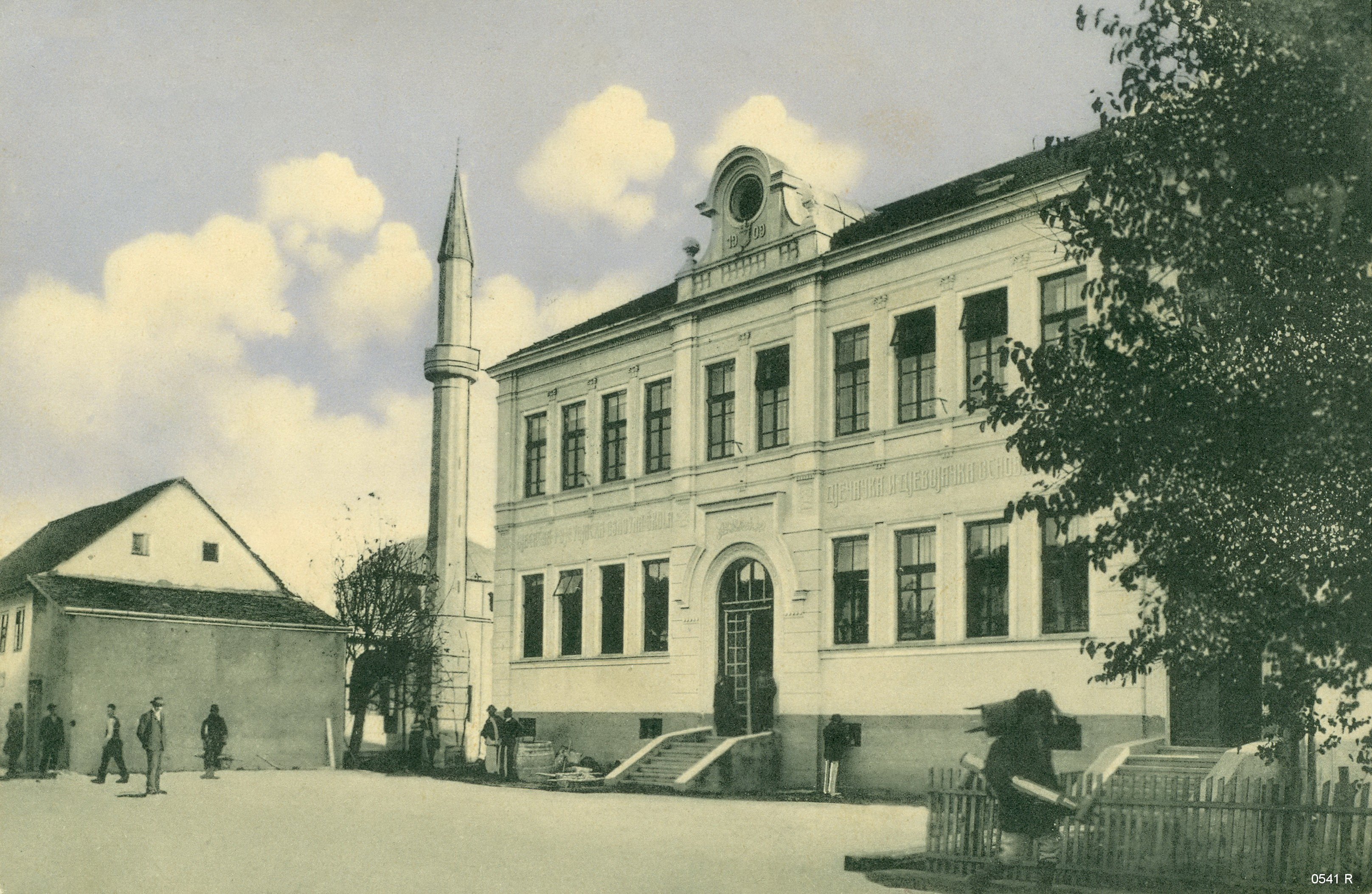 Bosanski Brod 1912. godine